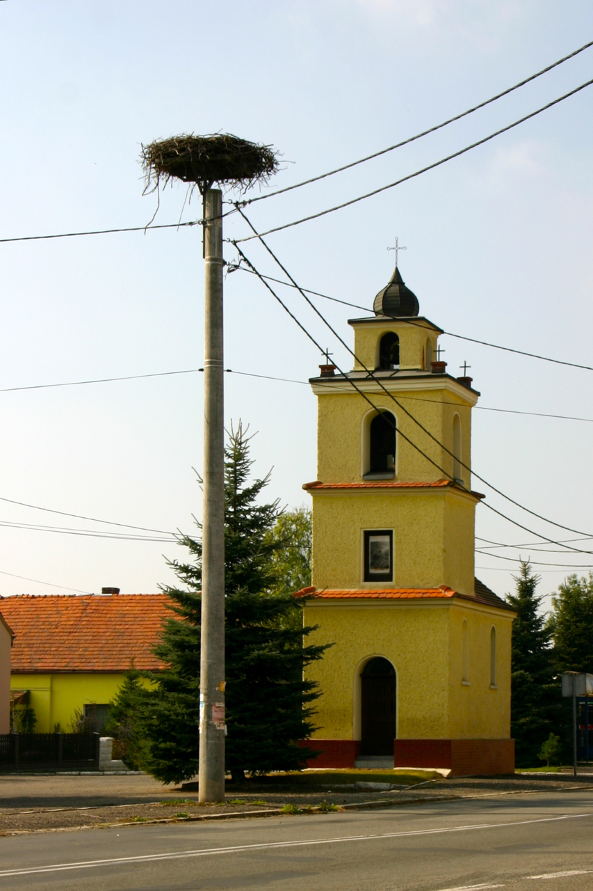 Poborszów (dodatkowa nazwa w j. niem. Poborschau) – wieś w Polsce położona w województwie opolskim, w powiecie kędzierzyńsko-kozielskim, w gminie Reńska Wieś.